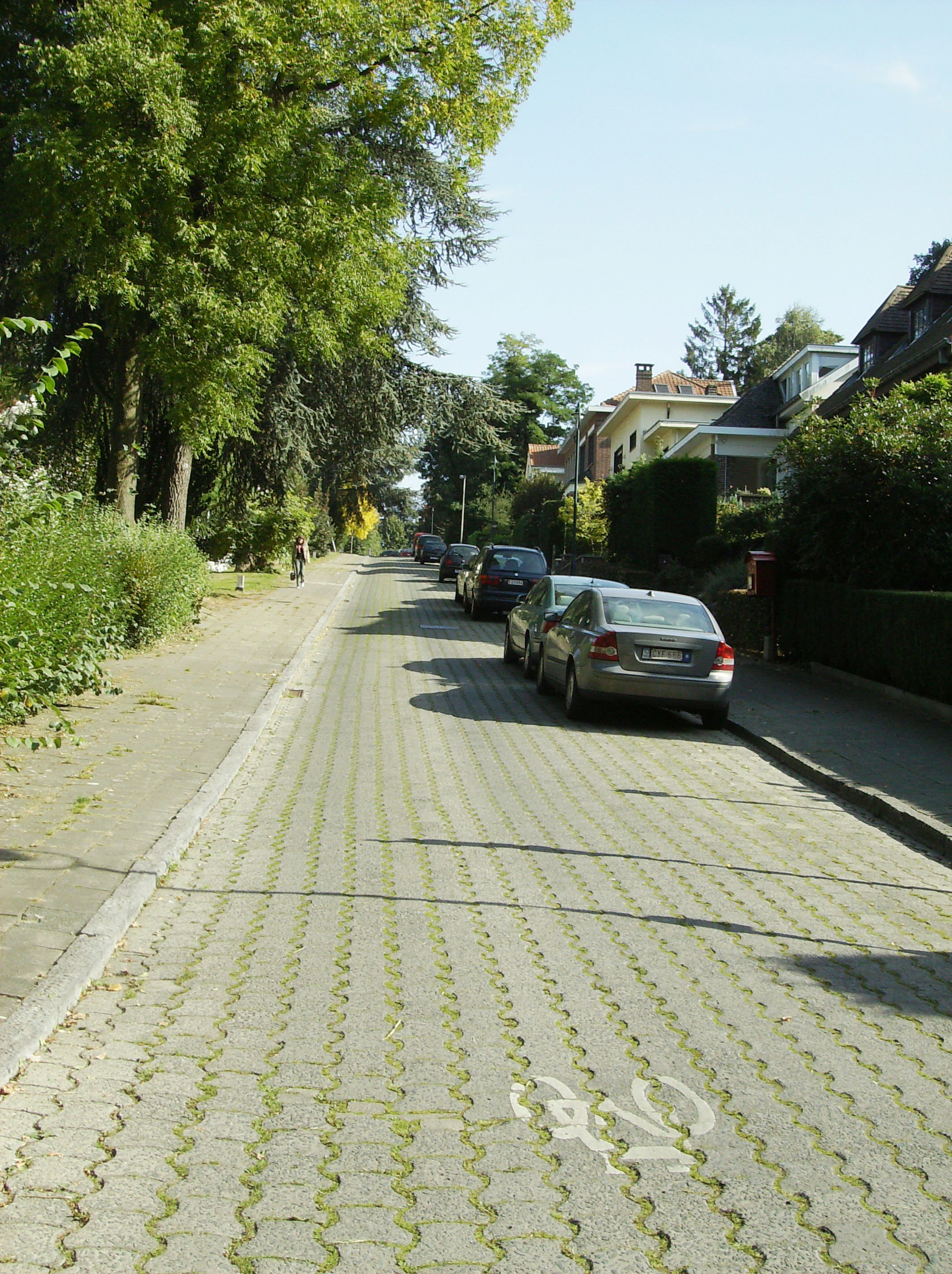 avenue René Stevens Auderghem